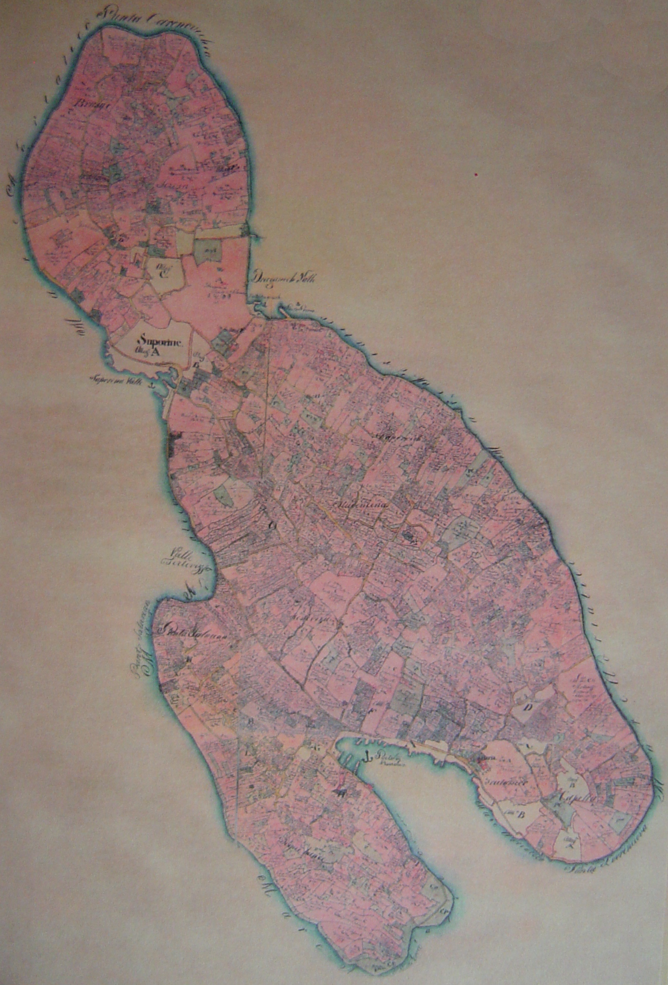 Katastarska mapa otoka Prvića iz 1825. First survey map of island of Prvić in Croatia.